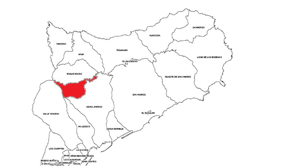 Localización de Casas de La Cubre